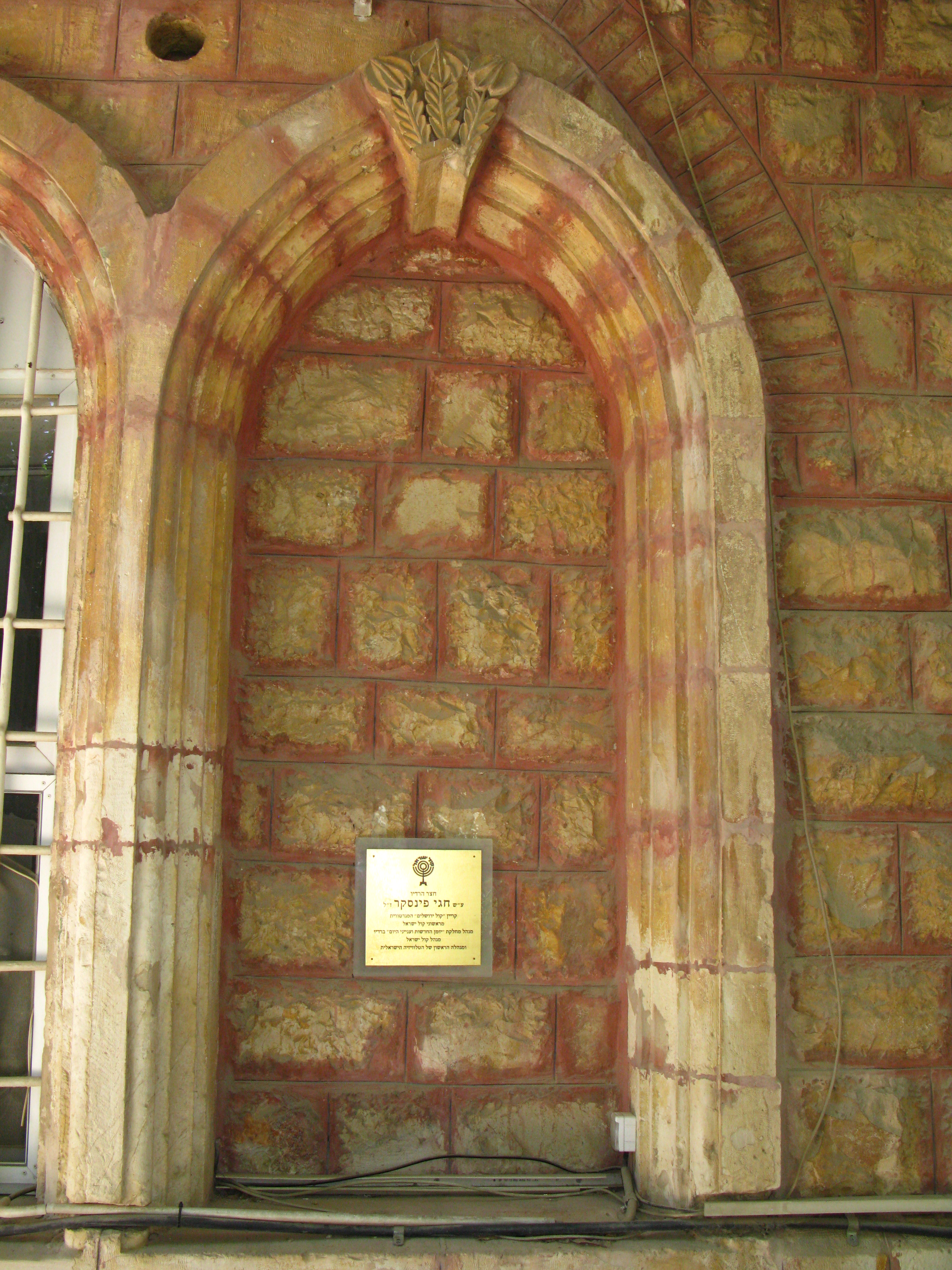 בניין קול ישראל ברחוב הלני המלכה בירושלים, משמש את תחנת הרדיו "קול ישראל" מאז ימי הרדיו המנדטורי ב-1939, ולסגירת רשות השידור.